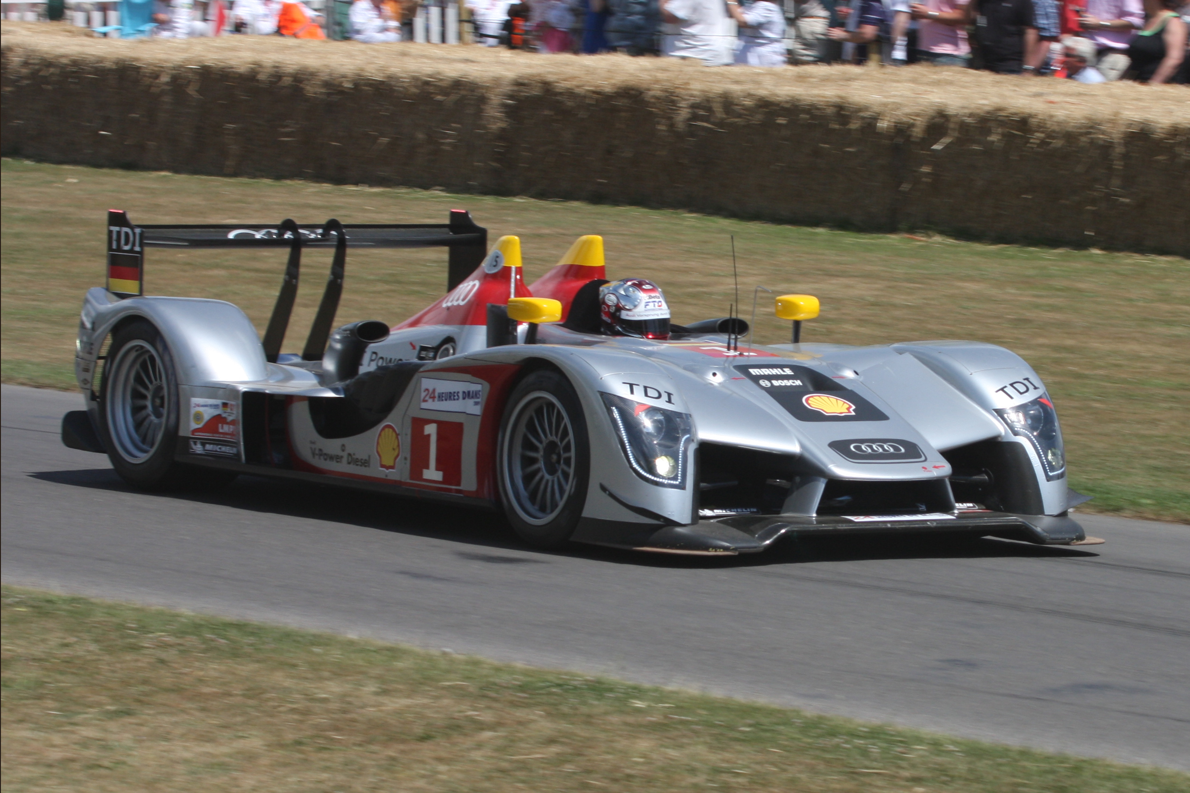 2009 Audi R15 TDI